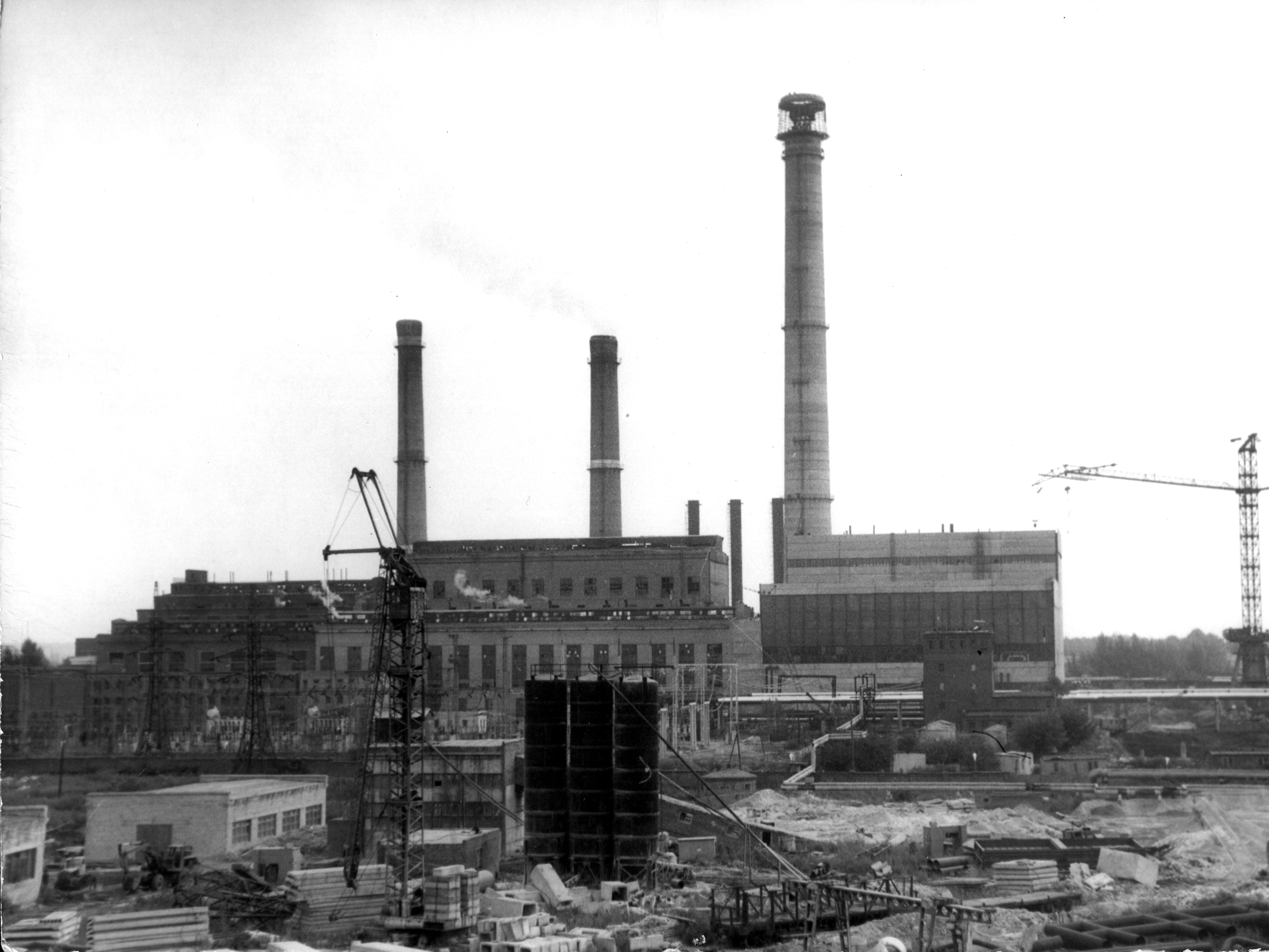 Строительство Тамбовской ТЭЦ